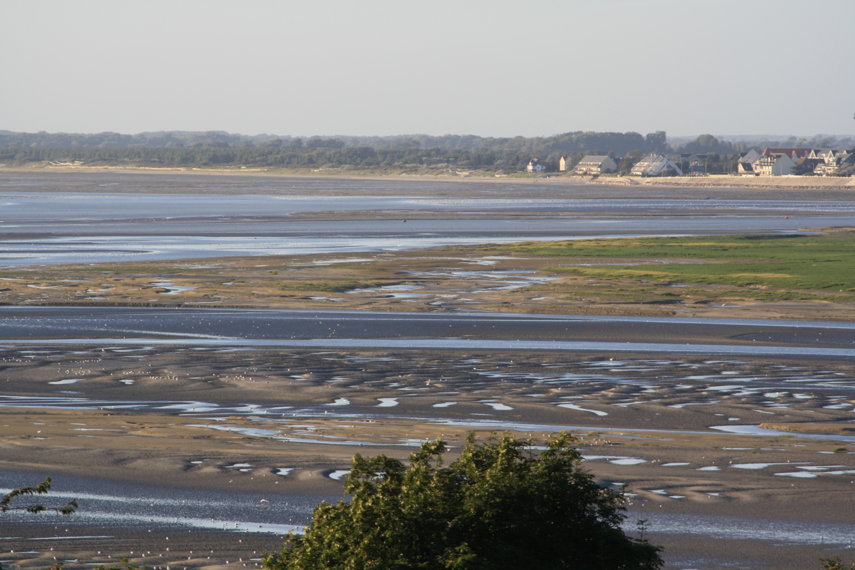 Vue de la baie de Somme à marée basse